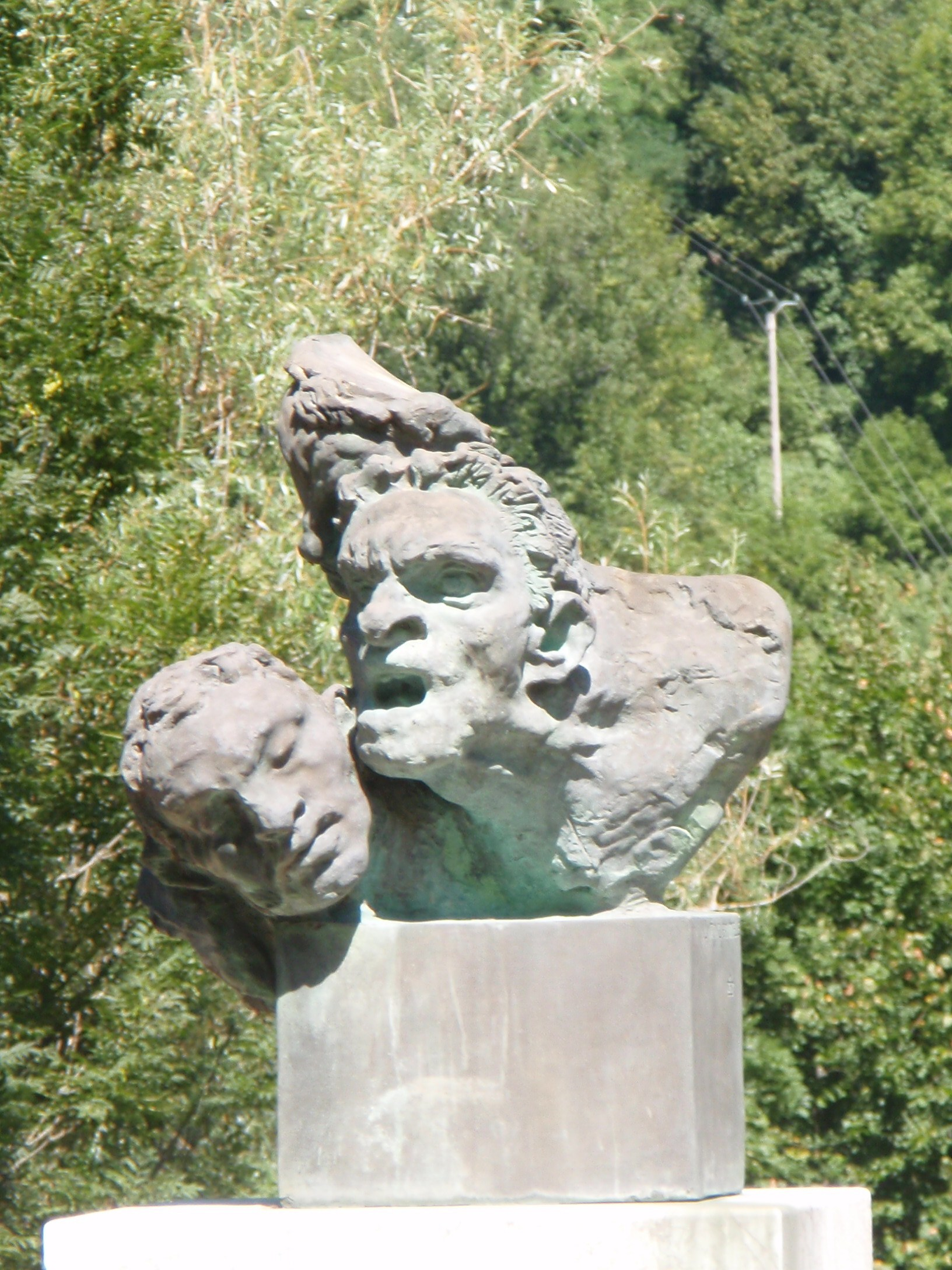 Monument aux morts de Capoulet-et-Junac du scupteur Antoine Bourdelle